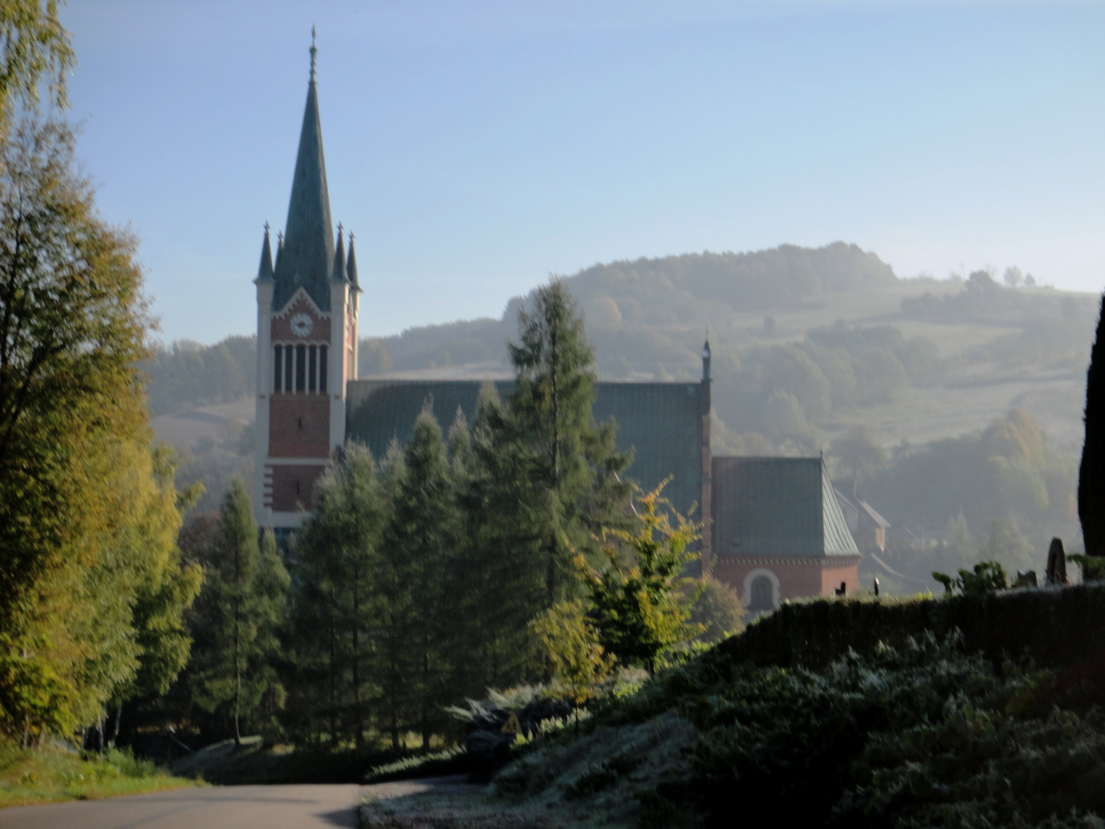 Porąbka Uszewska - kościół parafialny p.w. św. Andrzeja Apostoła